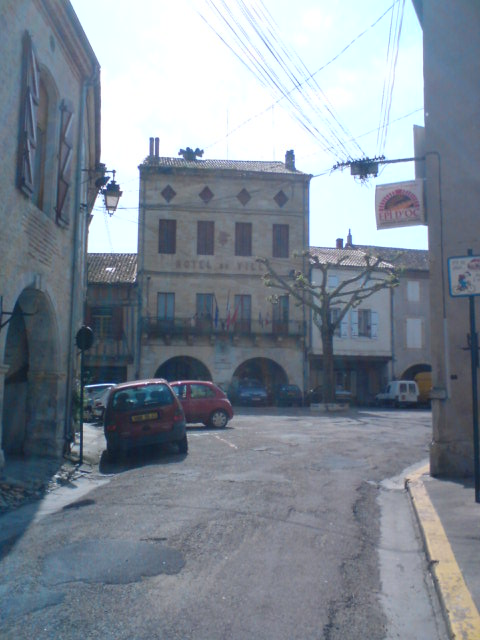 Mairie de Layrac